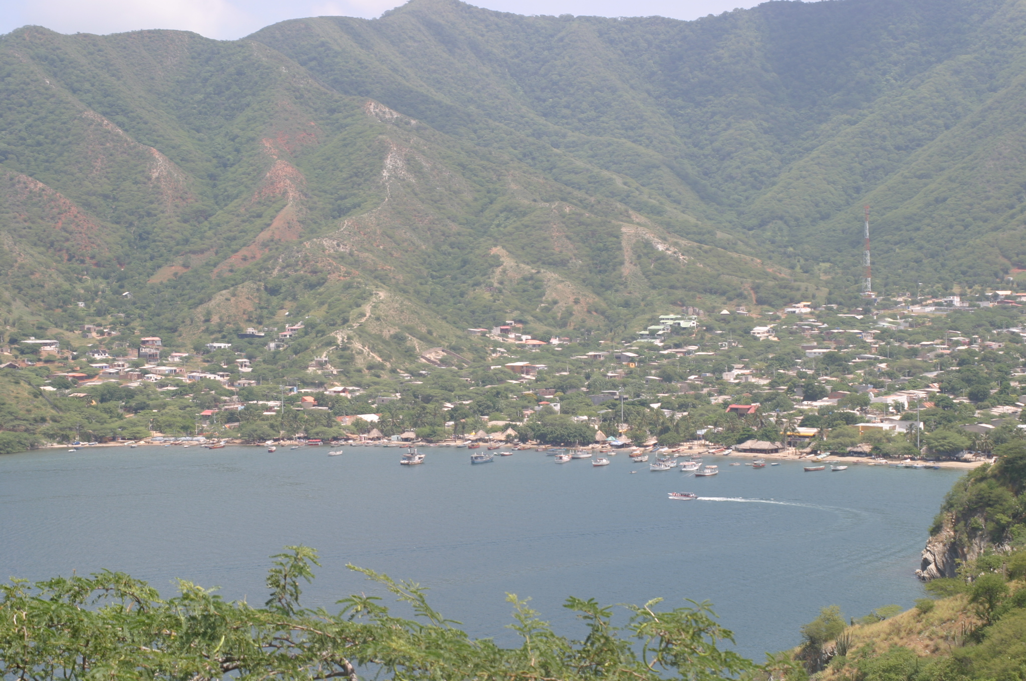 Foto Tomada en la vía que de Santa Marta conduce a Taganga en en el departamento de Magdalena Colombia